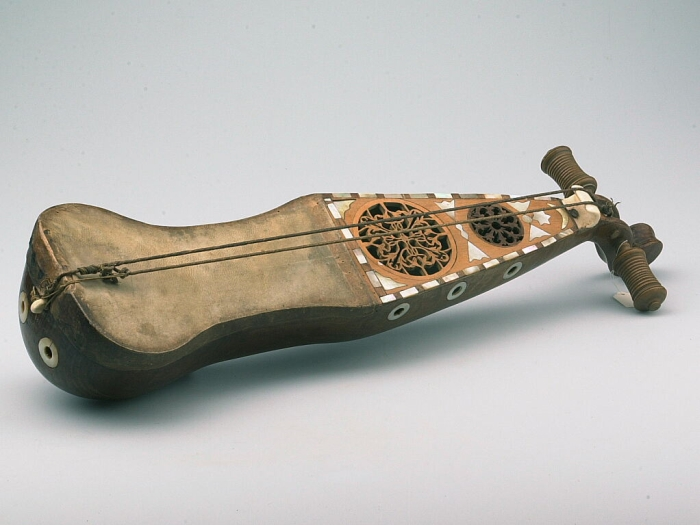 Deze gestreken korthalsluit, of vedel, heeft 2 snaren en dus 2 stempennen. Vanaf de stempennen lopen de snaren -waarschijnlijk van darm gemaakt- over een brug naar de onderkant van het instrument waar ze over een kam lopen (die hier ontbreekt), en aan een knop zijn vastgemaakt. De houten klankkast is gedeeltelijk afgedekt met leer, en gedeeltelijk met à jour bewerkt hout, dat versierd is met ingelegd parelmoer. Er zitten een aantal klankgaten in de klankkast, die met parelmoer zijn afgewerkt. Dit muziekinstrument (rebab) wordt gebruikt bij de Andalusische muziek in Marokko, met name in de steden waar Moren zich vestigden na de val van Andalusië (1492) zoals Fes, Tetouan, Salé en Rabat.